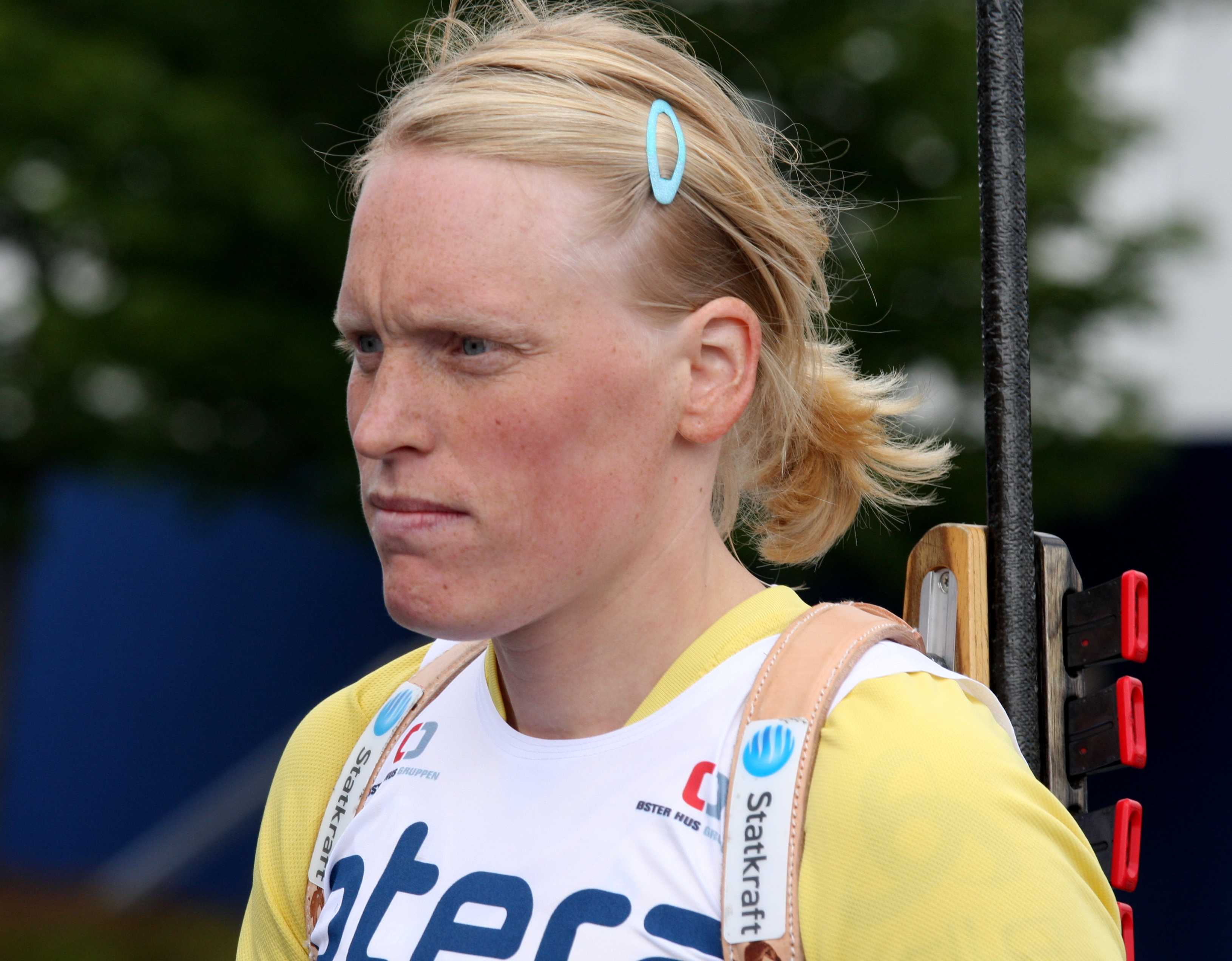 Tora Berger under Blinkfestivalen i Sandnes 2009